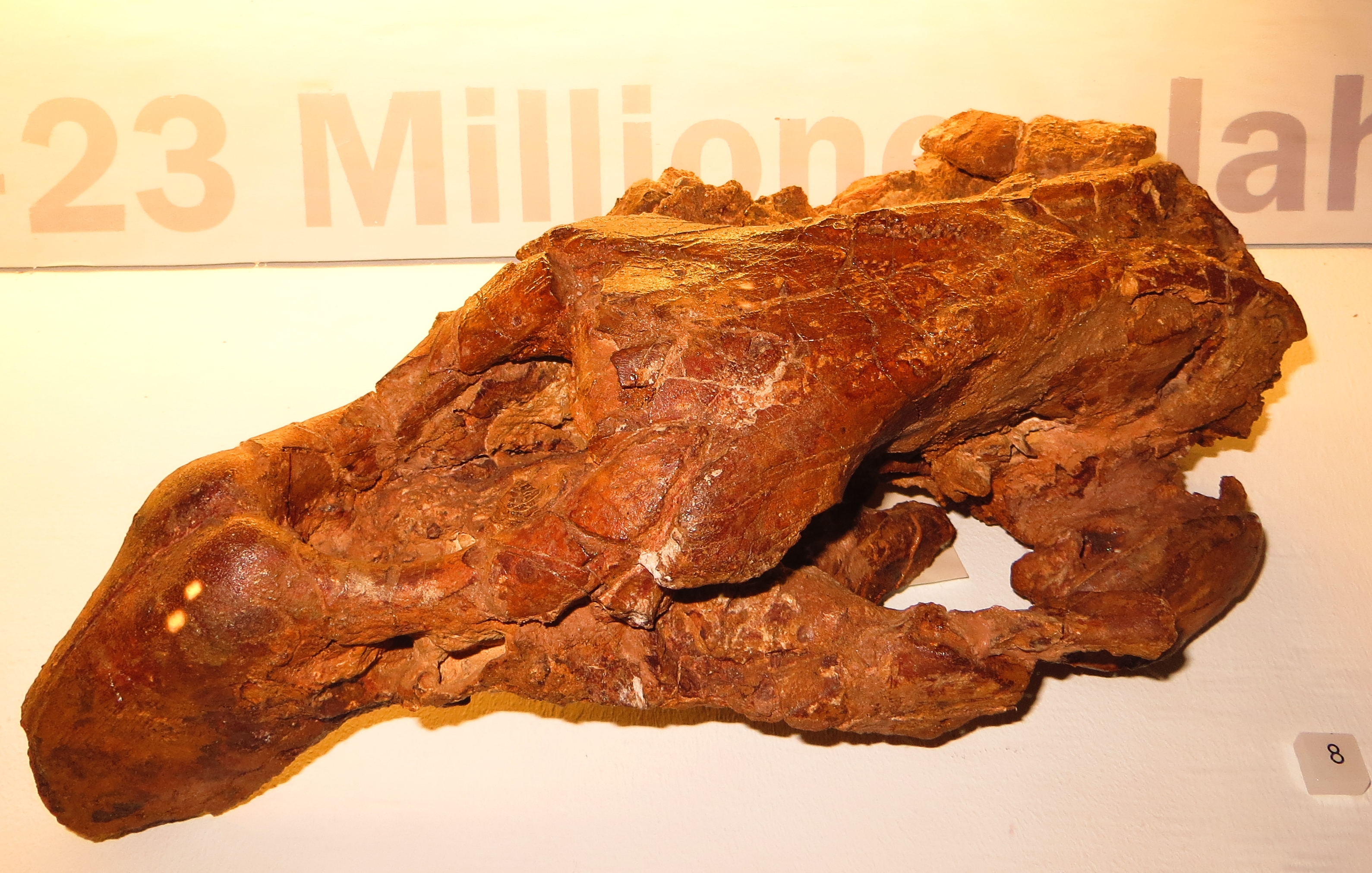 Fossil of Eosiren, an extinct mammal - Took the picture at Museum of Paleontology, Tuebingen